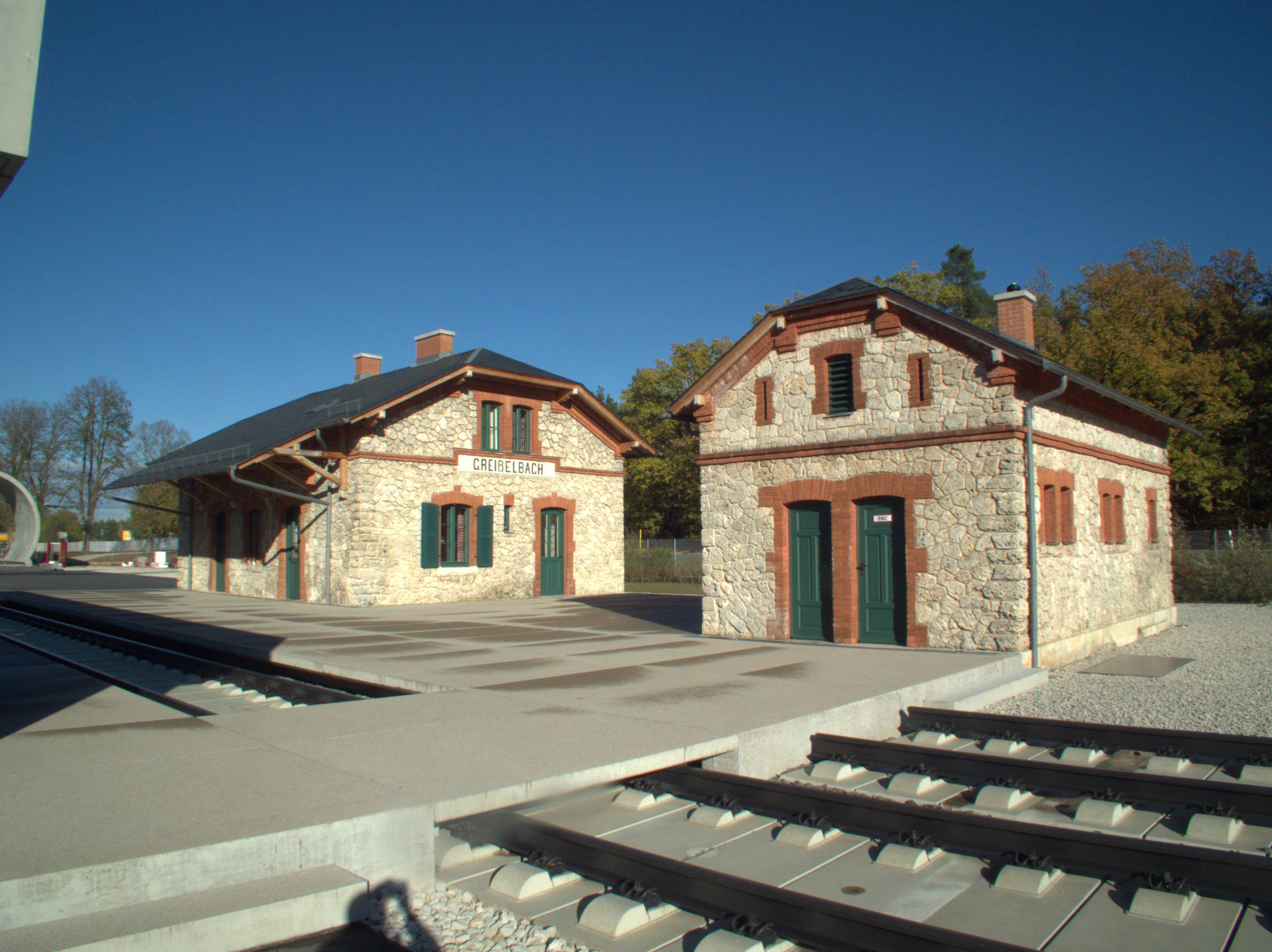 Der ehemalige Bahnhof der Oberpfälzer Sulztalbahn in Greißelbach, Gemeinde Sengenthal.